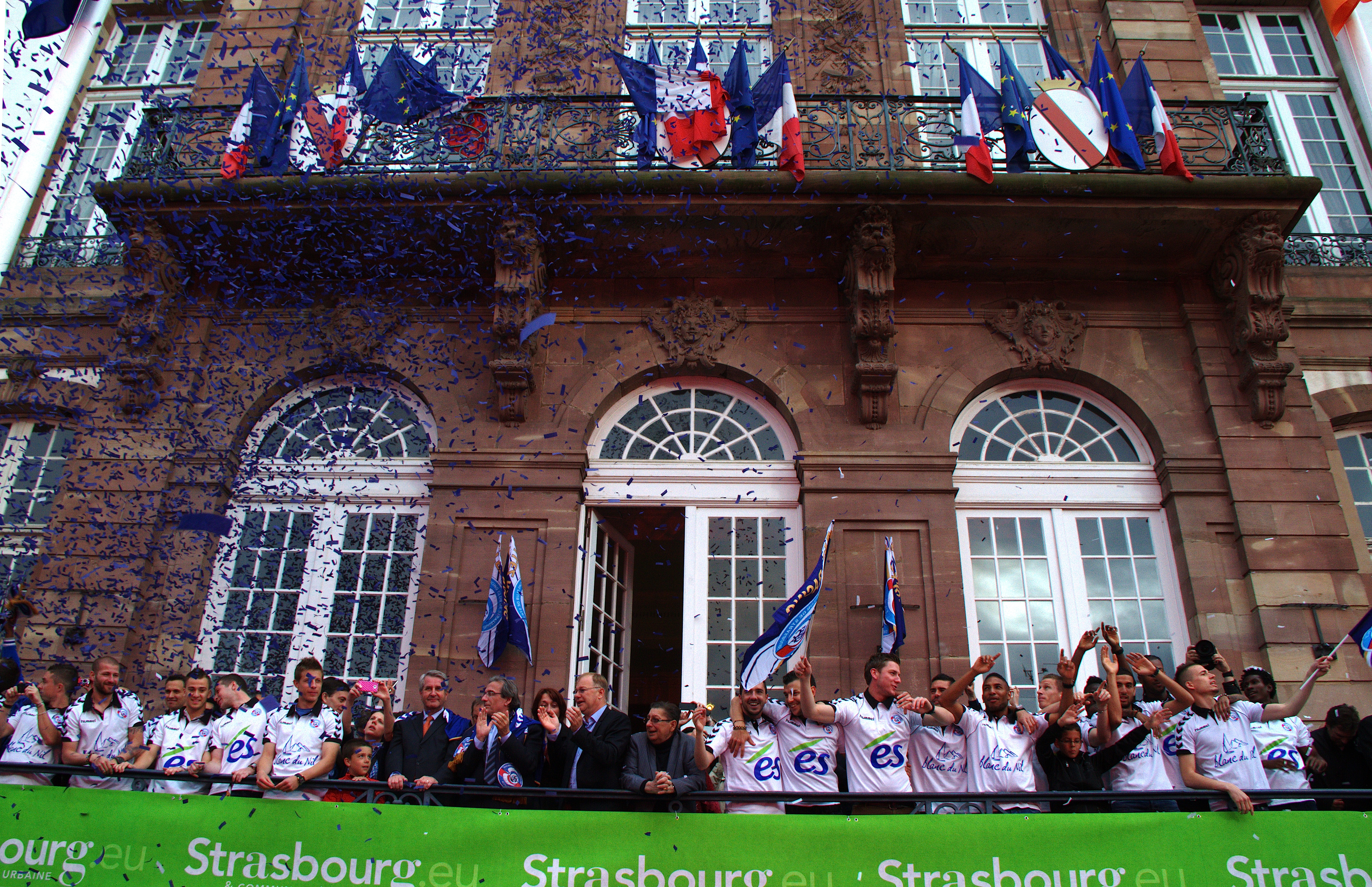 Les joueurs et les dirigeants du Racing Club de Strasbourg Alsace lors de la réception par les élus et la population strasbourgeoise à Hôtel de Ville après la remontée en National, 3 juin 2013